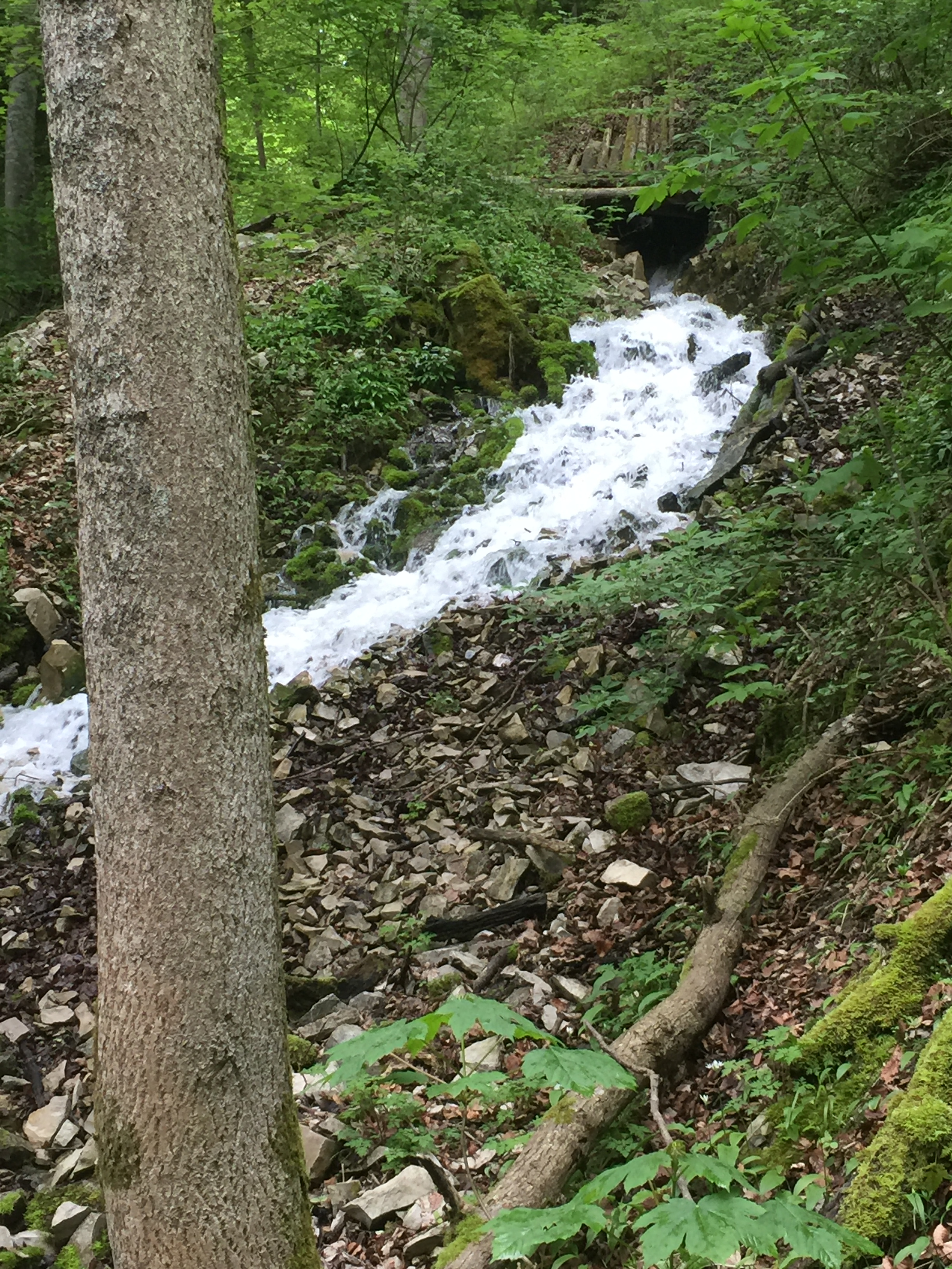 Bröller (Quelle) Zellerbach